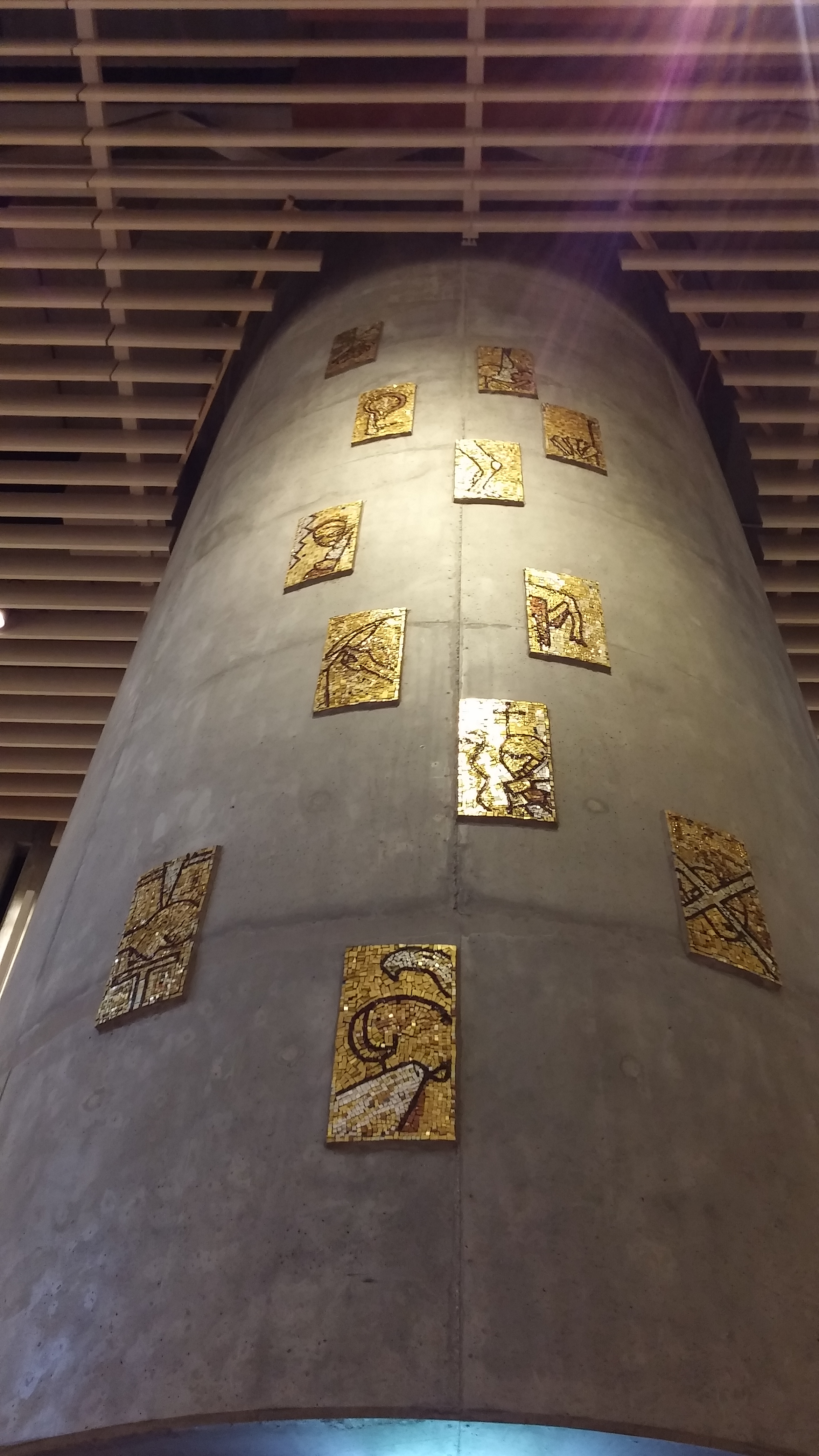 Detaljer på veggen i Nordlyskatedralen